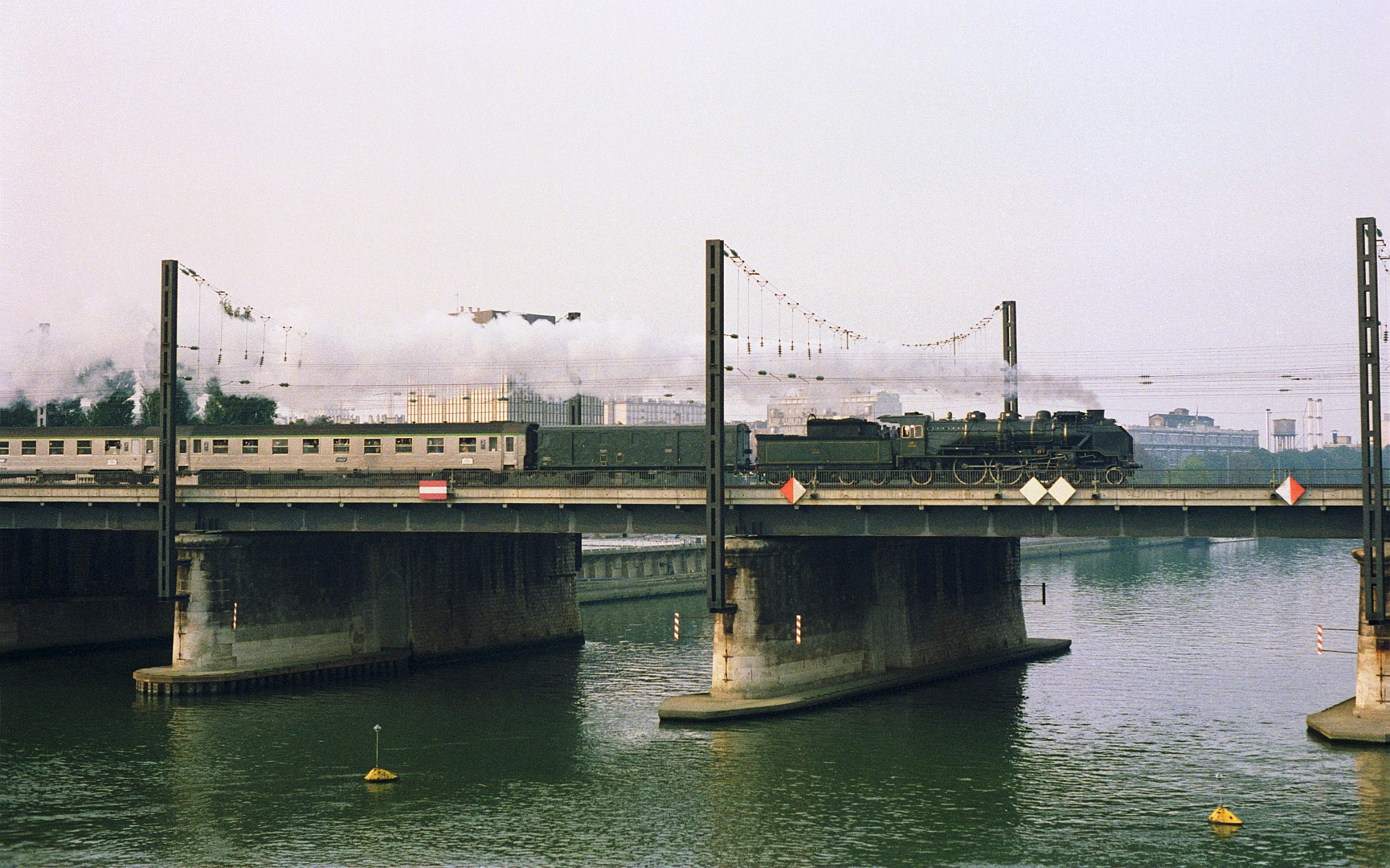 La 231 G 558 passe sur le pont ferroviaire d'Asnières avec un train pour Le Havre le 4 octobre 1987.